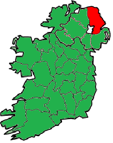 Ceann de 32 chontae na hÉireann